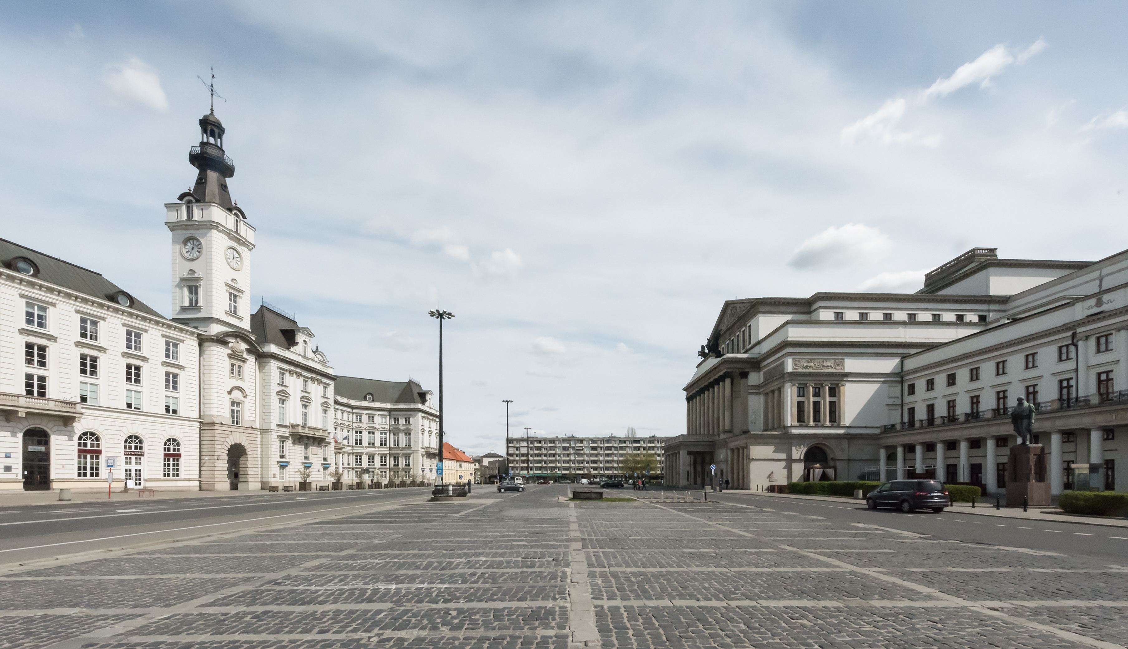 Plac Teatralny w Warszawie